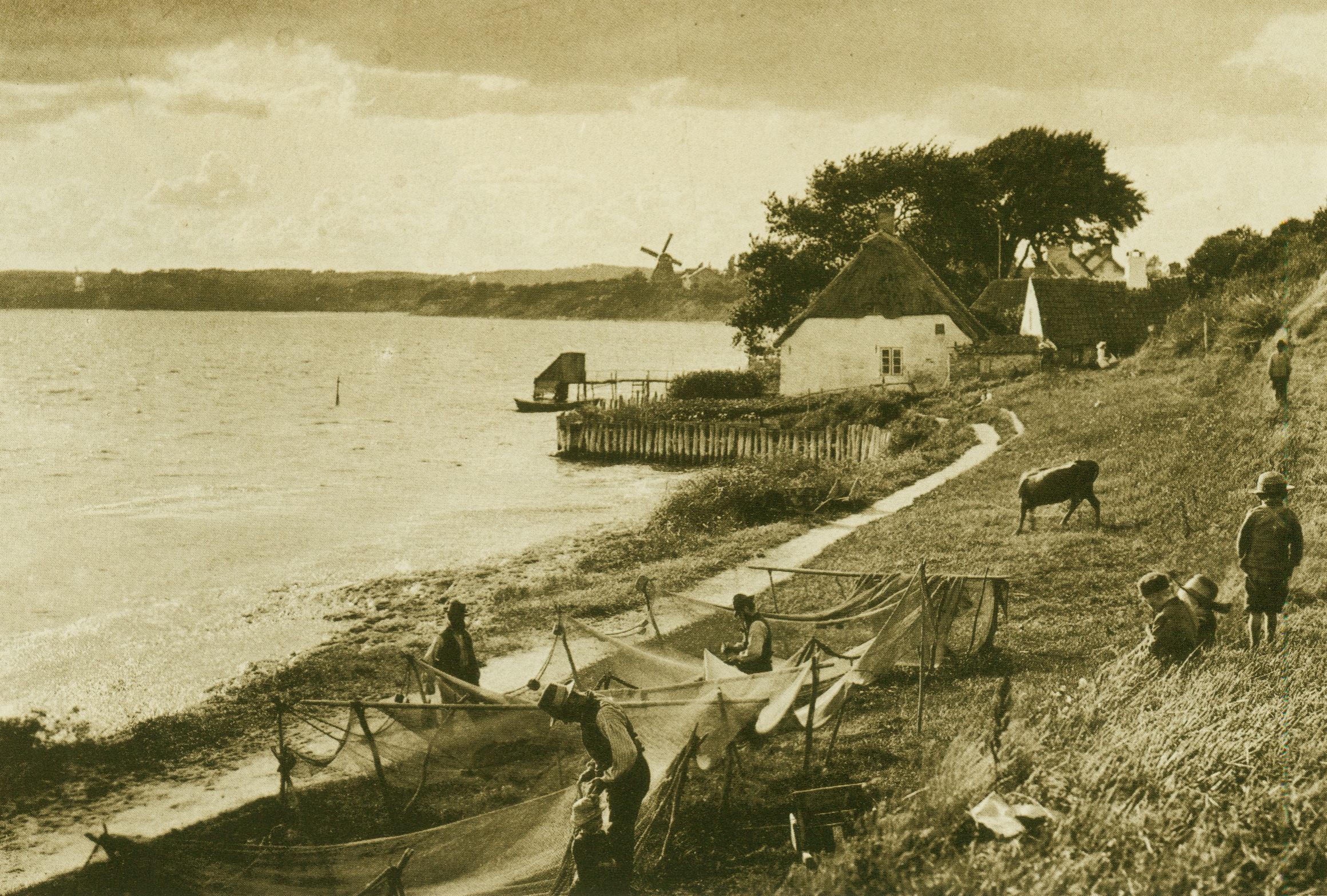 Ekensund (Egernsund), 1891–1895